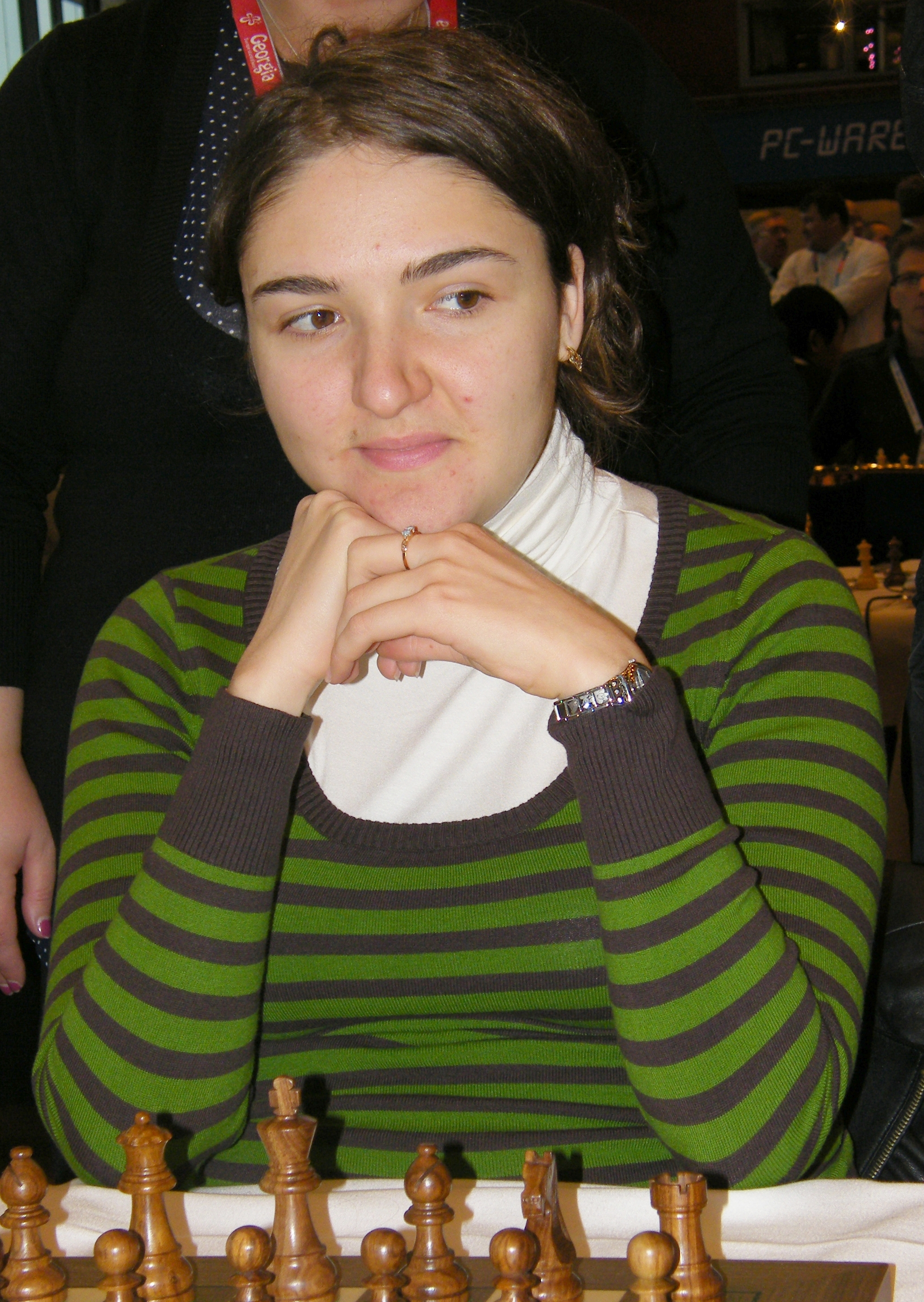 Nana Dzagnidze bei der 38. Schacholympiade in Dresden 2008